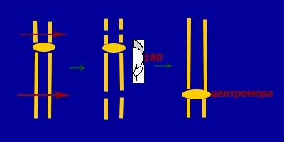 аутор: Снежана Трифуновић